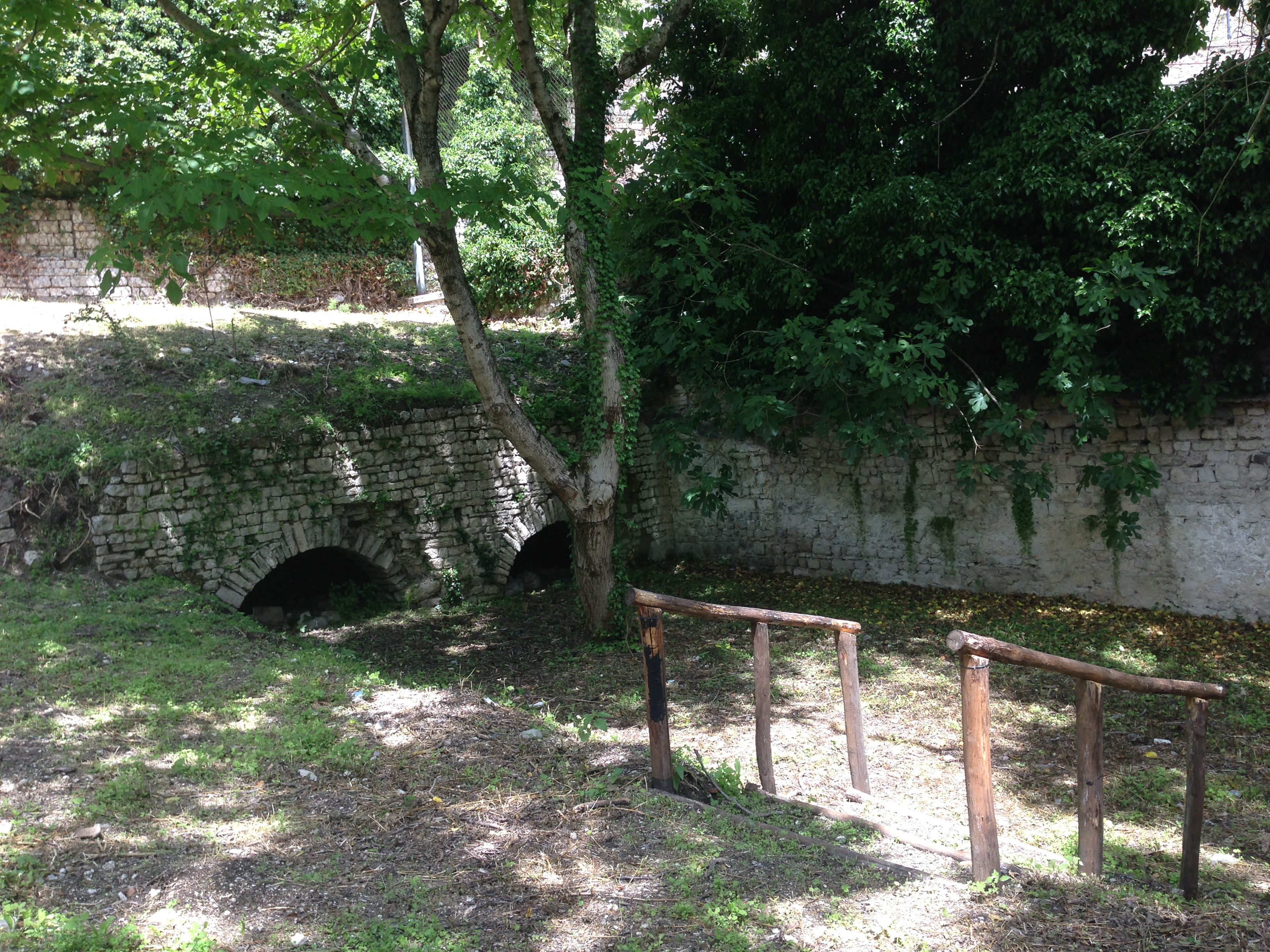 Ex Chiesa di San Marco. Spoleto